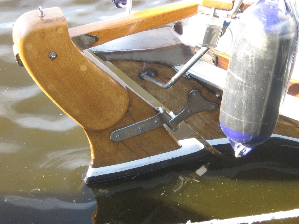 Ruderanlge eines Segelbootes im Greifswalder Hafen